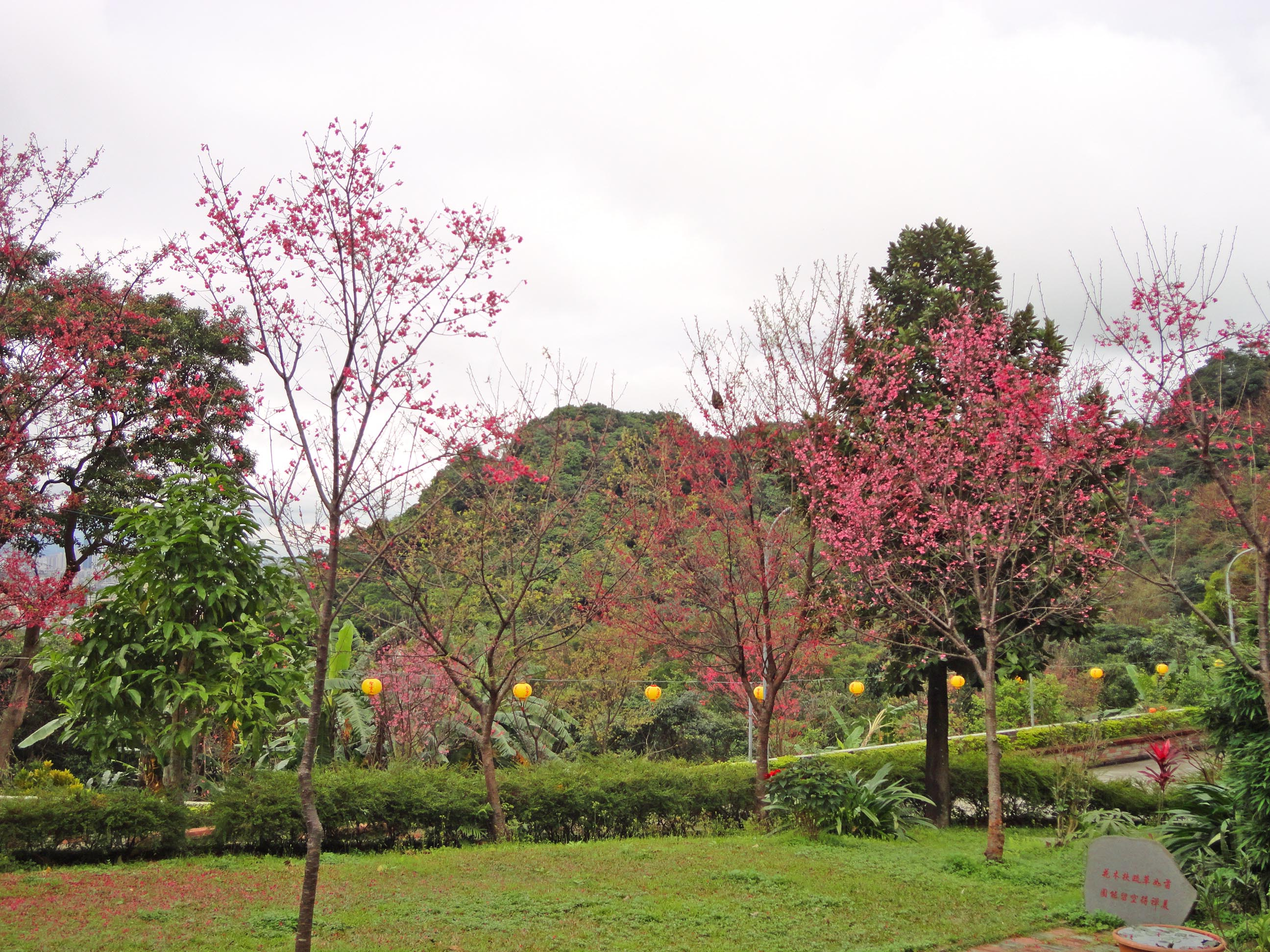 中文（台灣）: 新北市中和區員山路的玉皇宮道場的山櫻花盛開